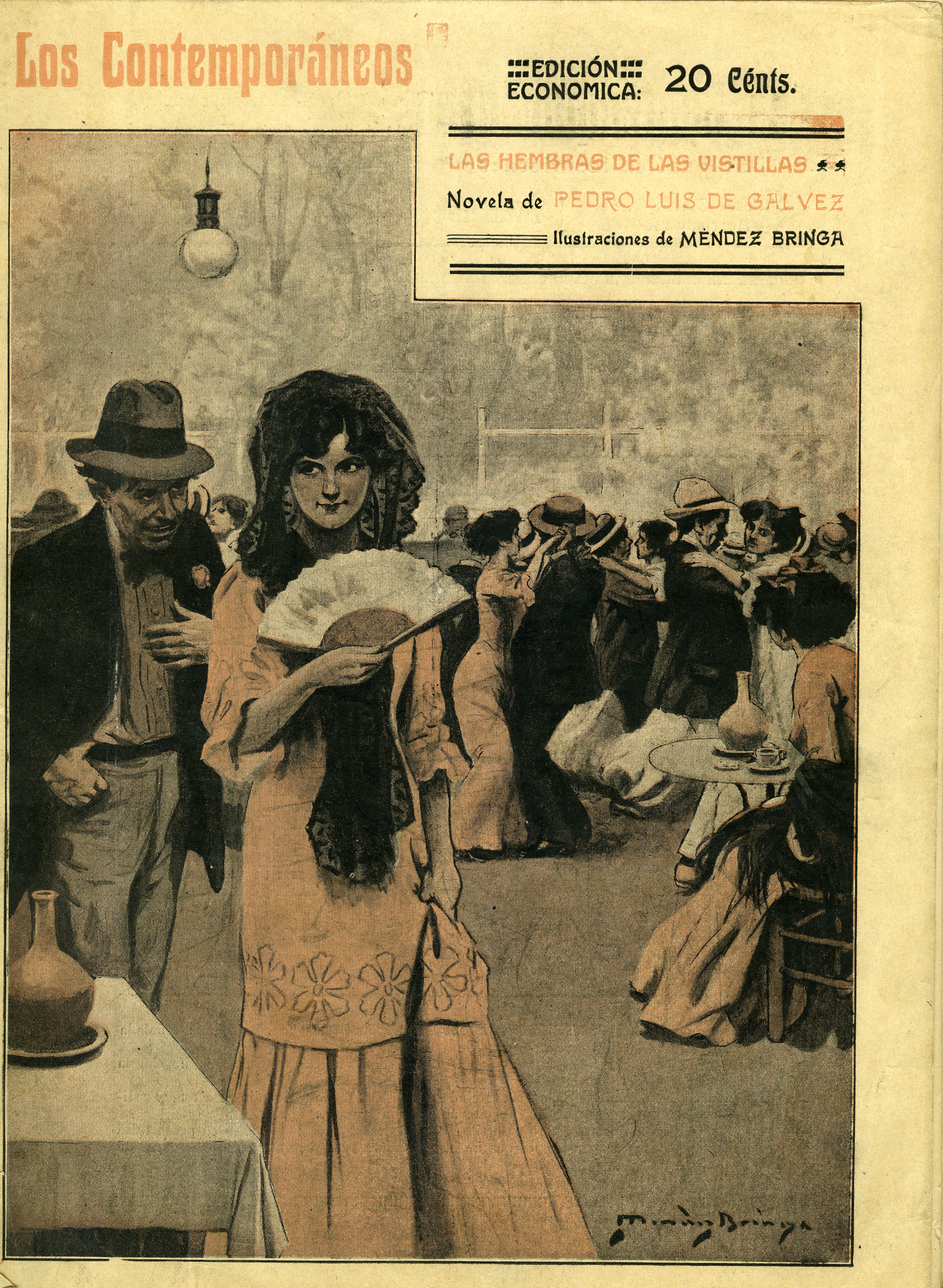 Portada de Las hembras de las Vistillas.